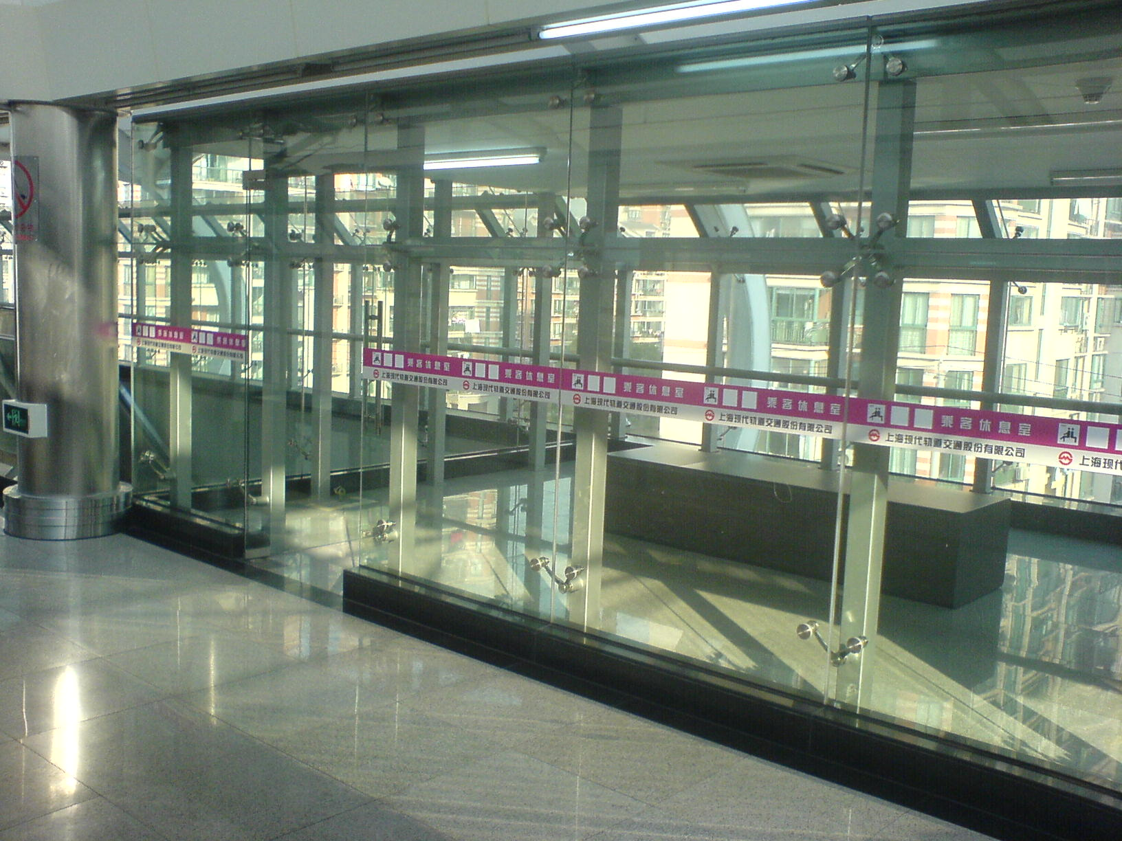 五莲路站站台